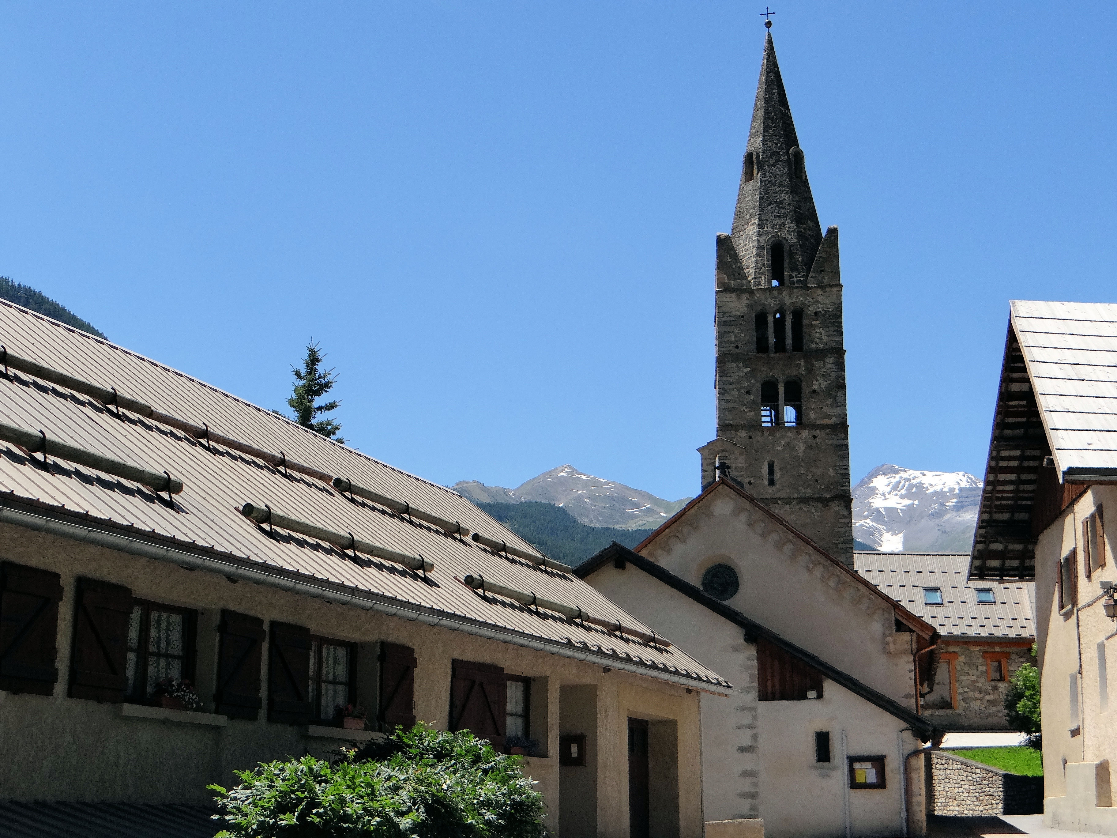 Les Vigneaux - Rue principale et église Saint-Laurent